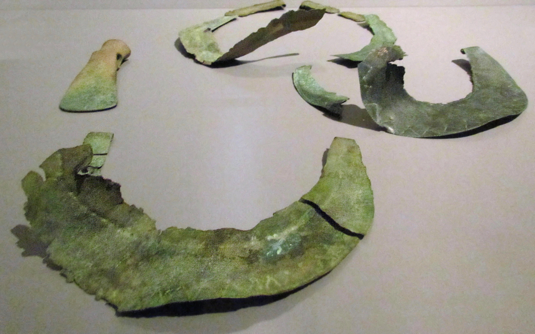 Kupferhort von Lüstringen in der Ausstellung "Bewegte Zeiten. Archäologie in Deutschland" in Berlin